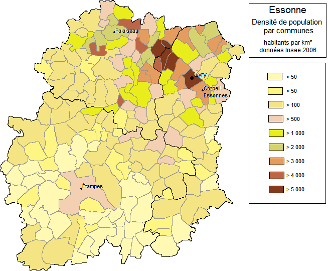 Carte de répartition de densité géographie par communes en Essonne en 2006